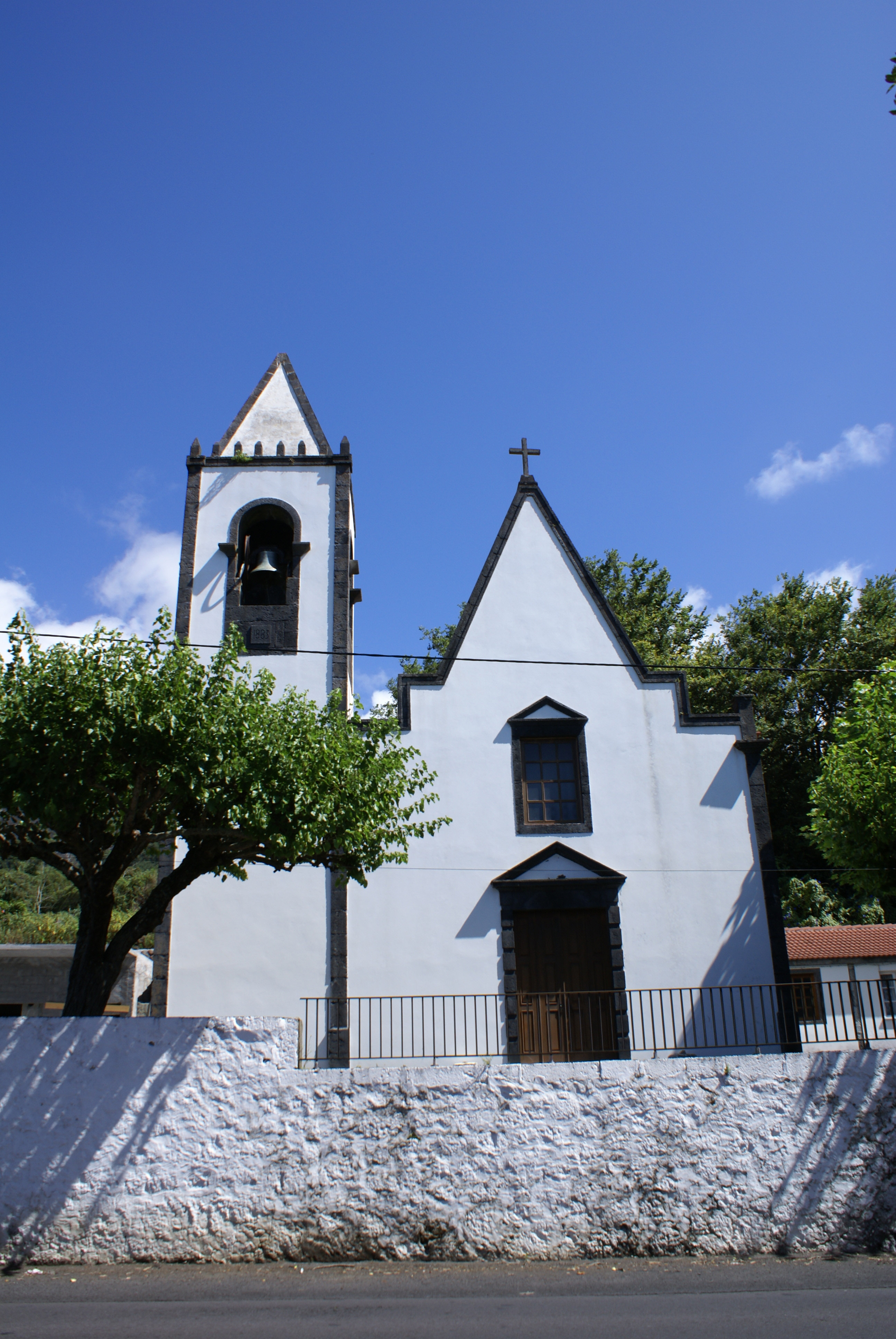 Ermida de Nossa Senhora da Boa Hora, fachada, Fajã de Santo Amaro, Velas, ilha de São Jorge, Açores